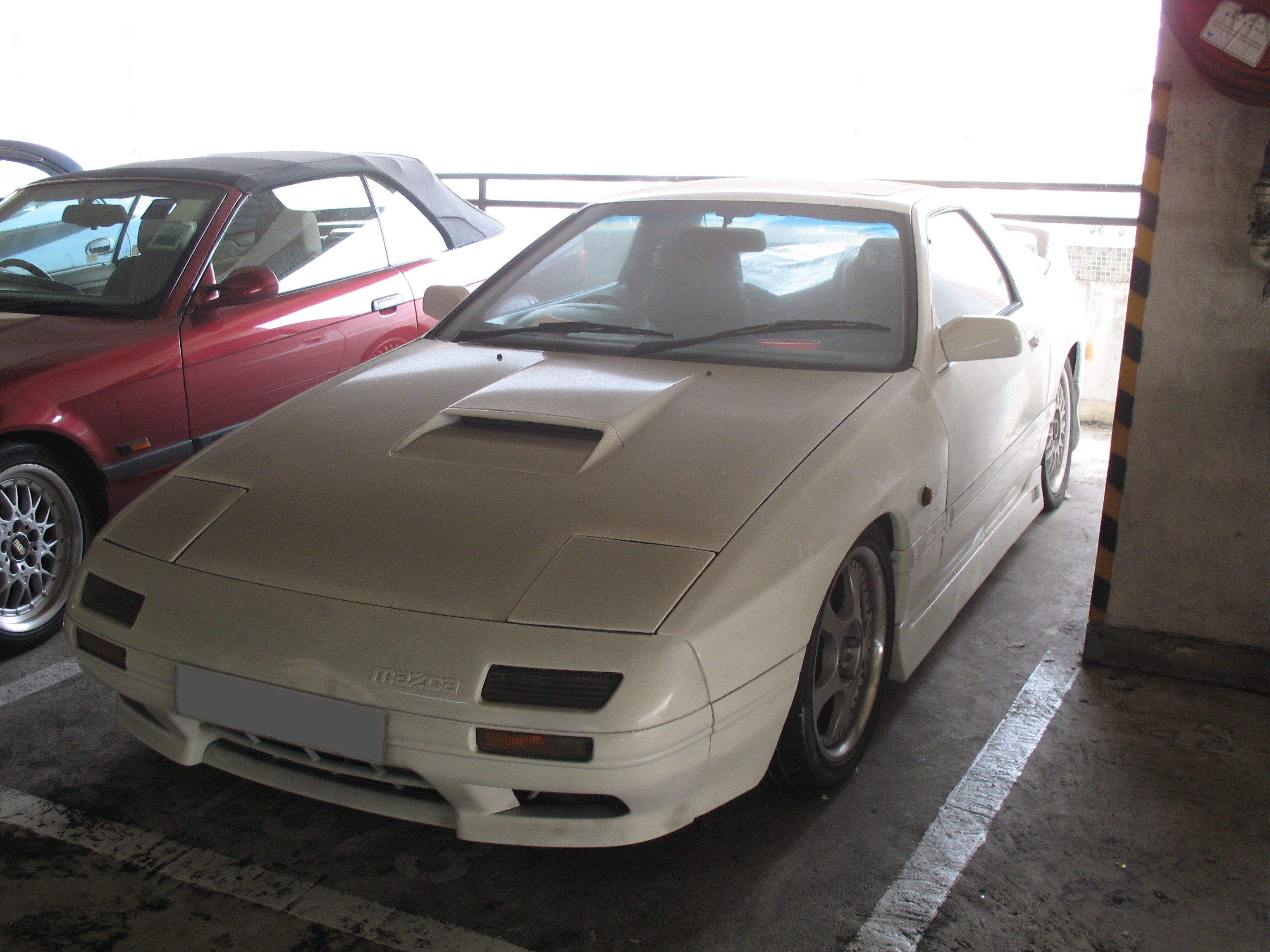 Mazda RX-7 FC